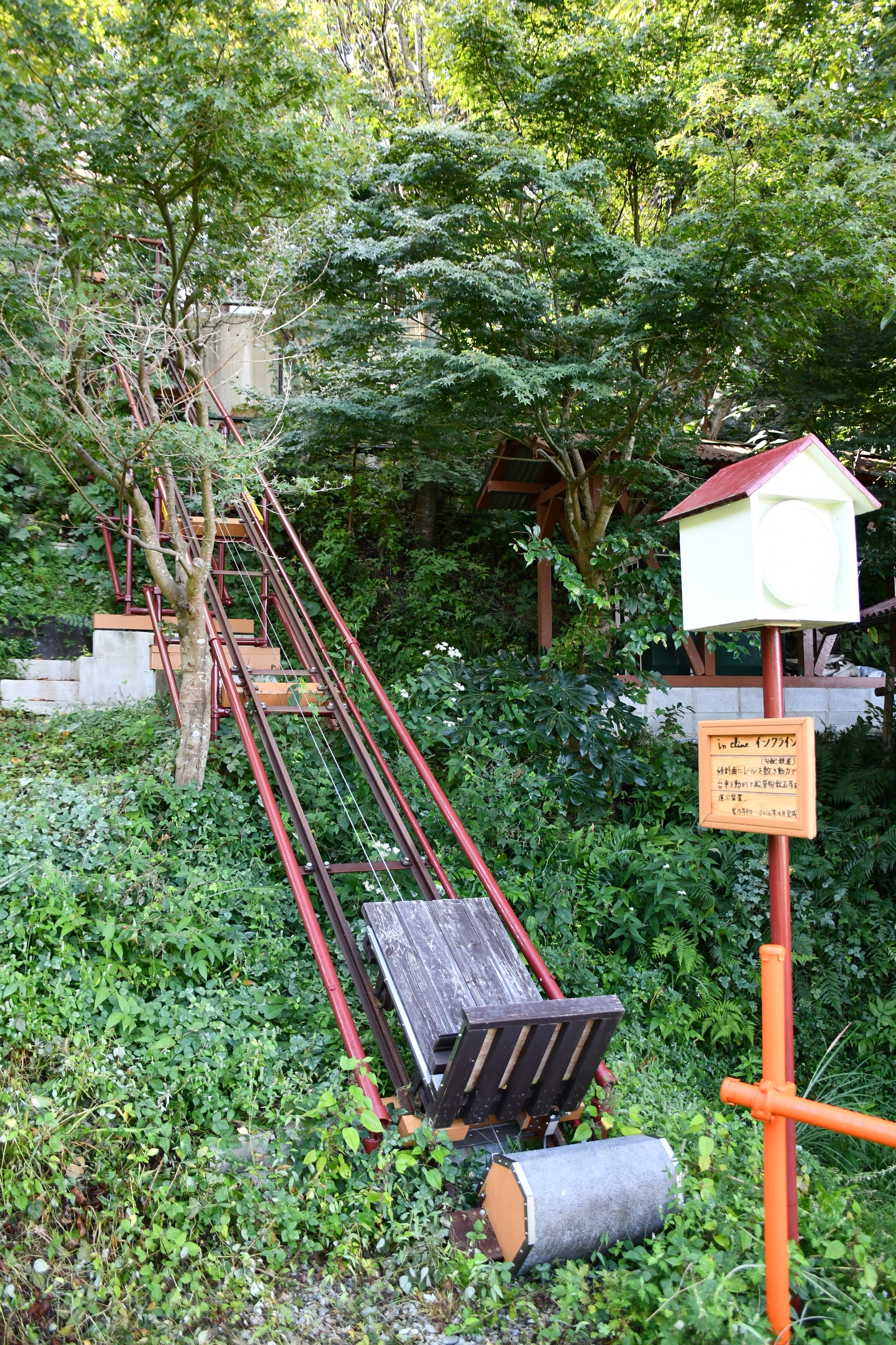 2017/10/1桜谷軽便鉄道南山線駐車場より桜谷軽便鉄道インクラインを撮影。